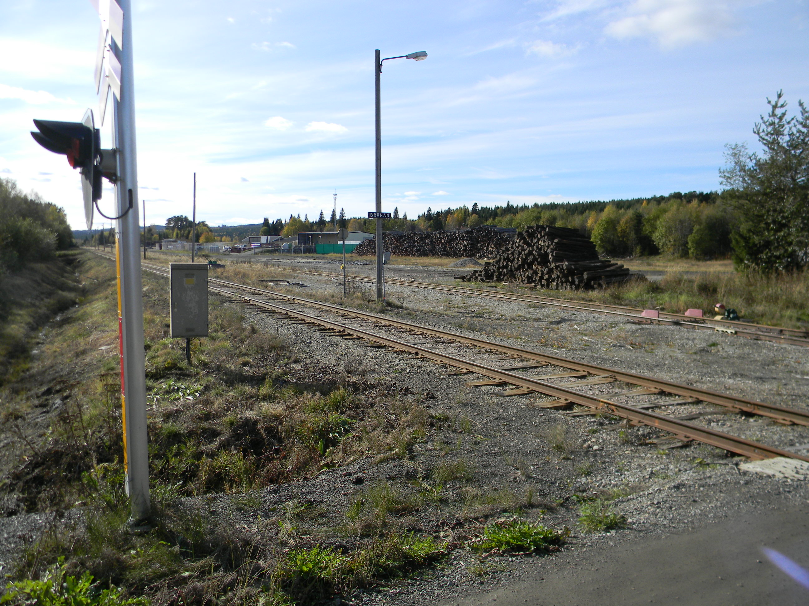 Godsterminalen Brånan på Inlandsbanan